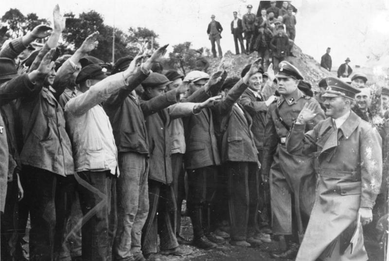 Westwall, Besichtigung durch Adolf Hitler Der Führer in der Festungslinie. Der Führer und Oberste Befehlshaber der Wehrmacht besichtigte im Anschluß an seinen Aufenthalt in Saarbrücken Befestigungsanlagen und Truppenteile im Westen. Ueberall dort, wo sich der Führer zeigte, wurden ihm begeisterte Kundgebungen durch die Truppen, die innerhalb der Befestigungen tätigen Arbeitskräfte und die gesamte Grenzbevölkerung bereitet. Der Führer nahm die Gelegenheit wahr, zahlreiche Male den ihn umringenden Arbeitermassen seinen Dank für ihre Leistungen auszusprechen: der Führer bei seinen Arbeitern. 12.10.38 Abgebildete Personen: Hitler, Adolf: Reichskanzler, Deutschland